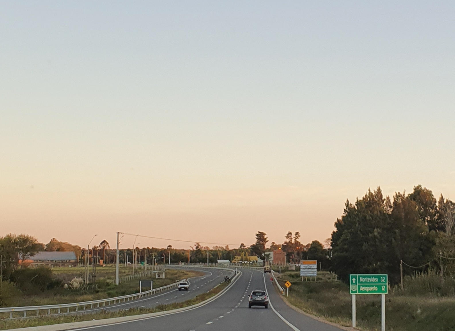 Ruta 101 a la altura del km 33.200 en el departamento de Canelones.